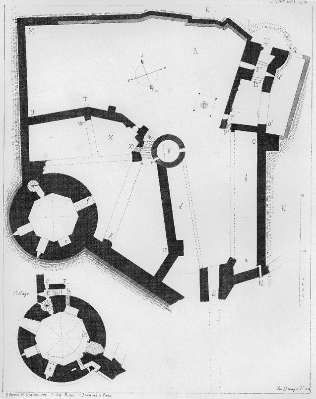 Plan du château de Langoiran